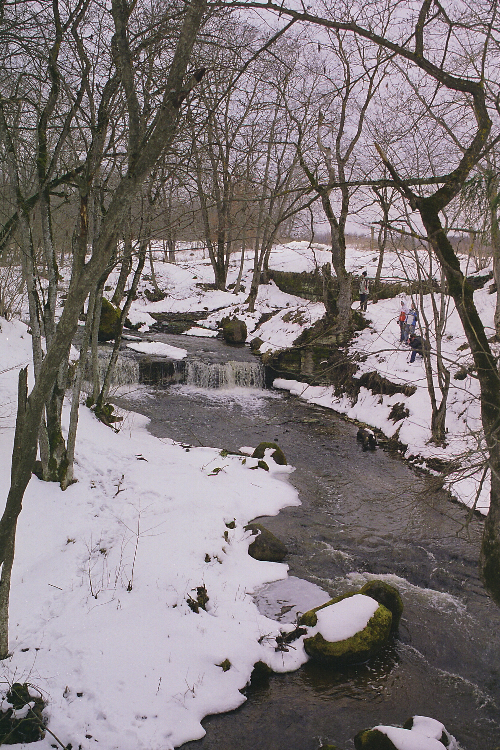 Aluoja joastik